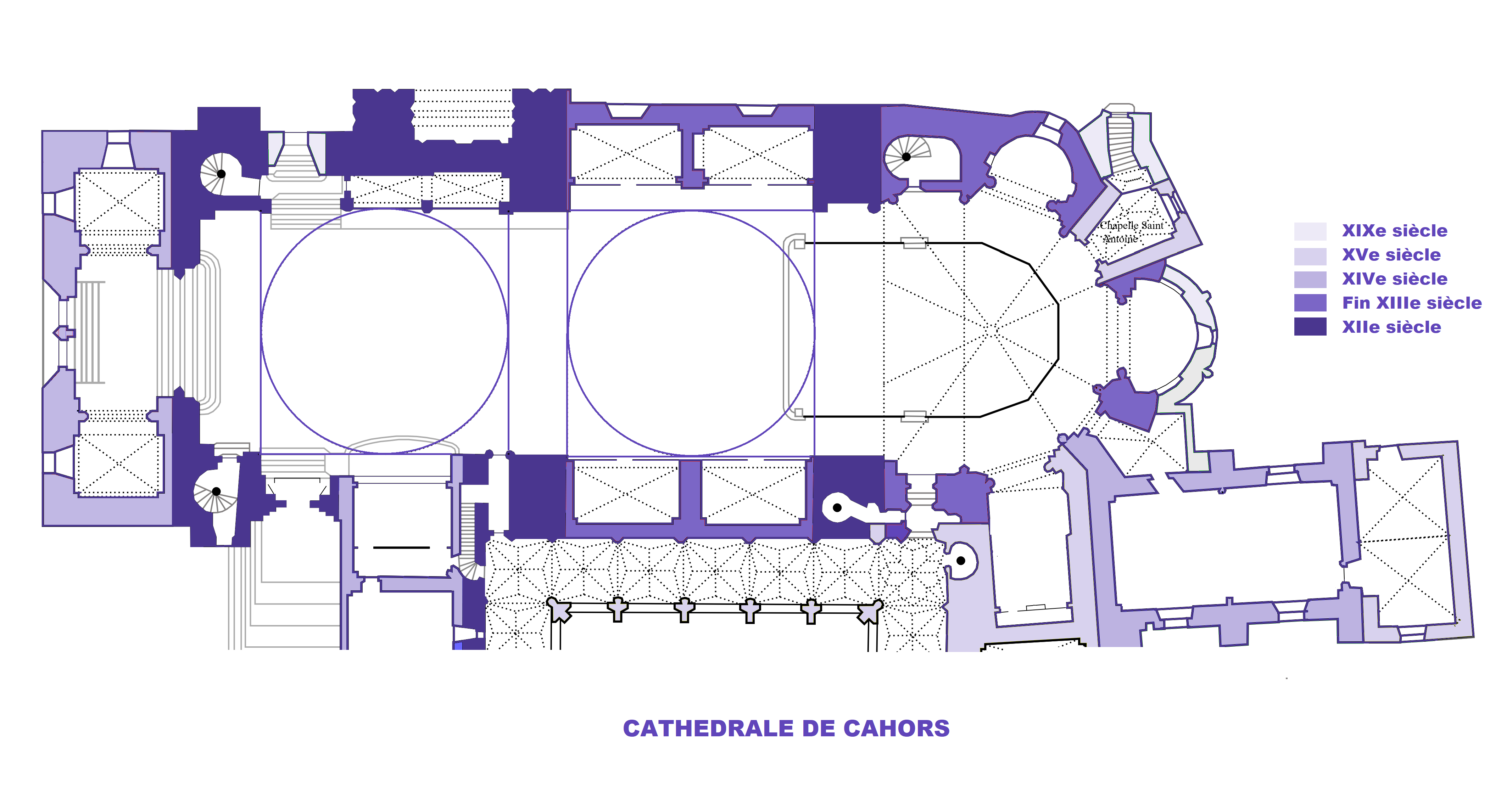 Cathédrale de Cahors, Plan (Image Commons modifiée)